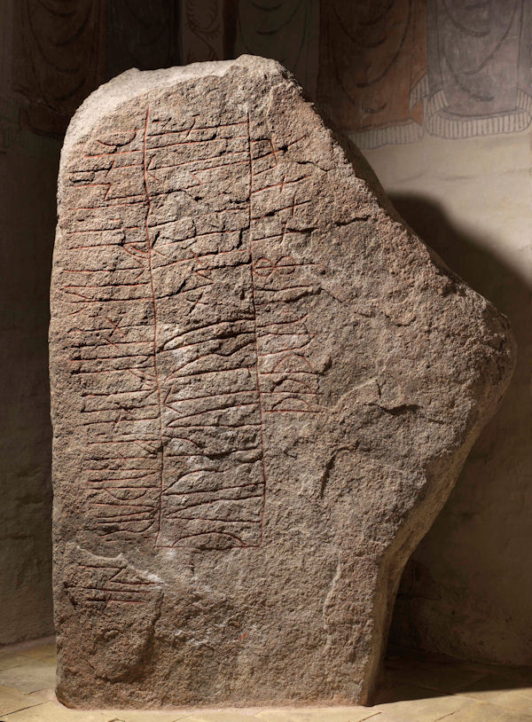 Foto af Roberto Fortuna